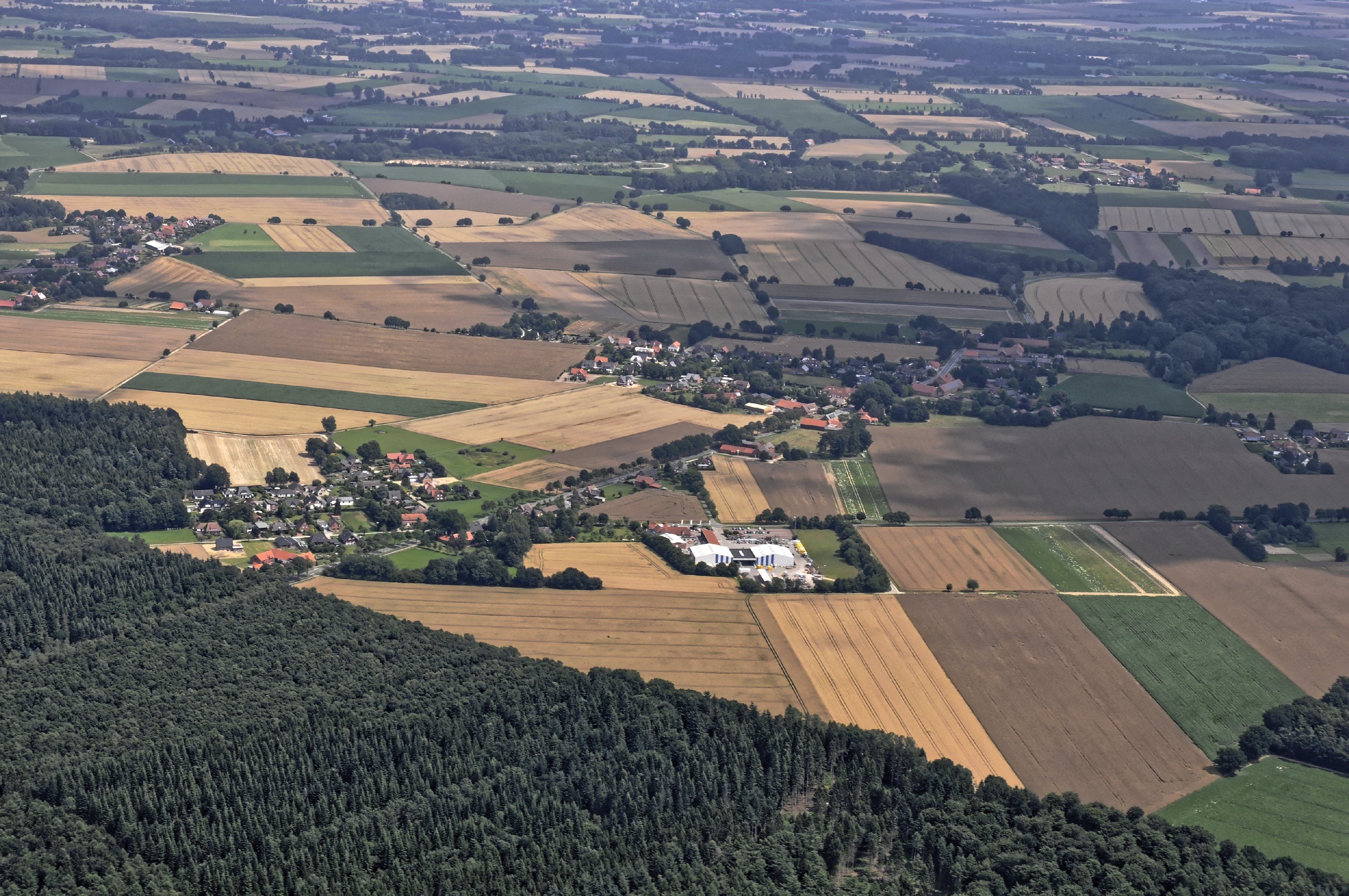 Bilder vom Flug Nordholz-Hammelburg 2015: Schnepke